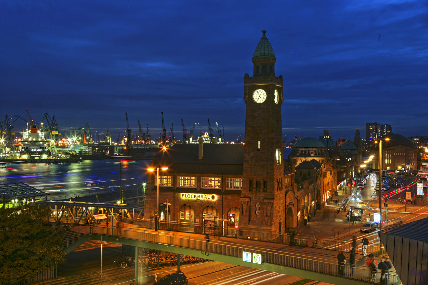 Hamburg Landungsbrücken after sundown